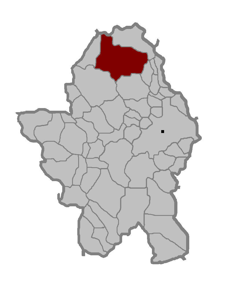 Насељено мјесто Поткозарје